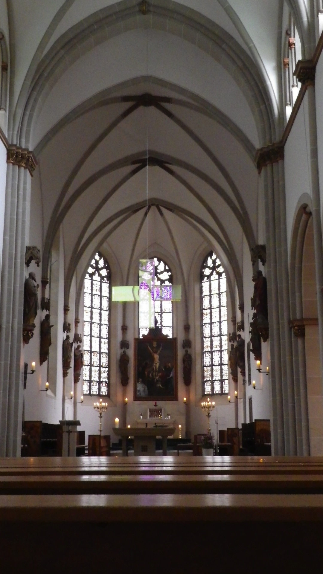 Blick durch das Kirchenschiff